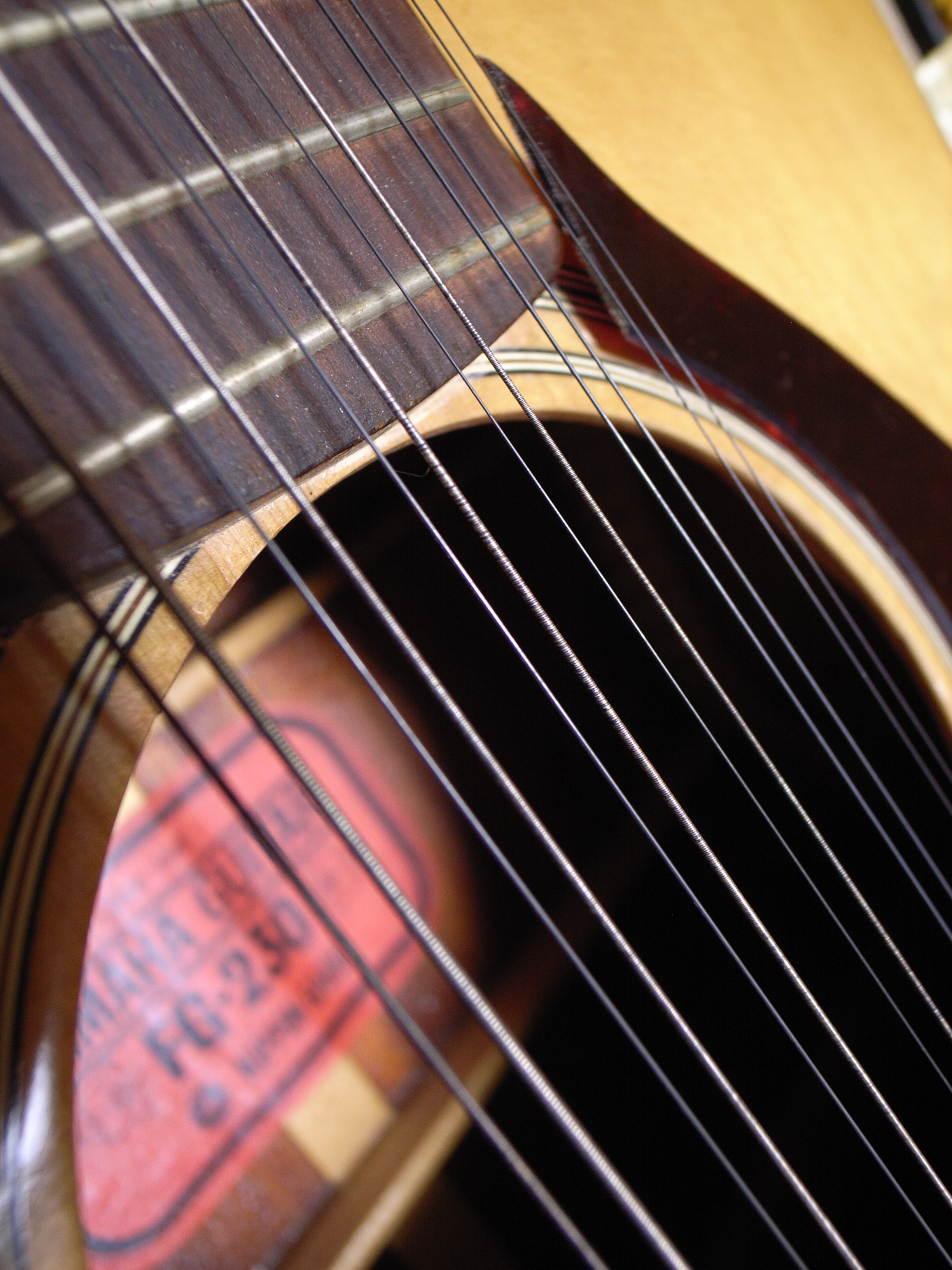 YAMAHA 12 Strings guitar FG-230